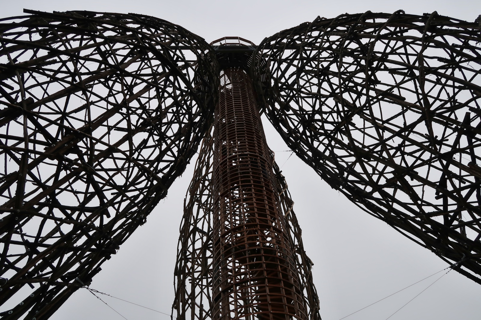 Rozhledna Doubravka je složena z tisíce kmínků akátu